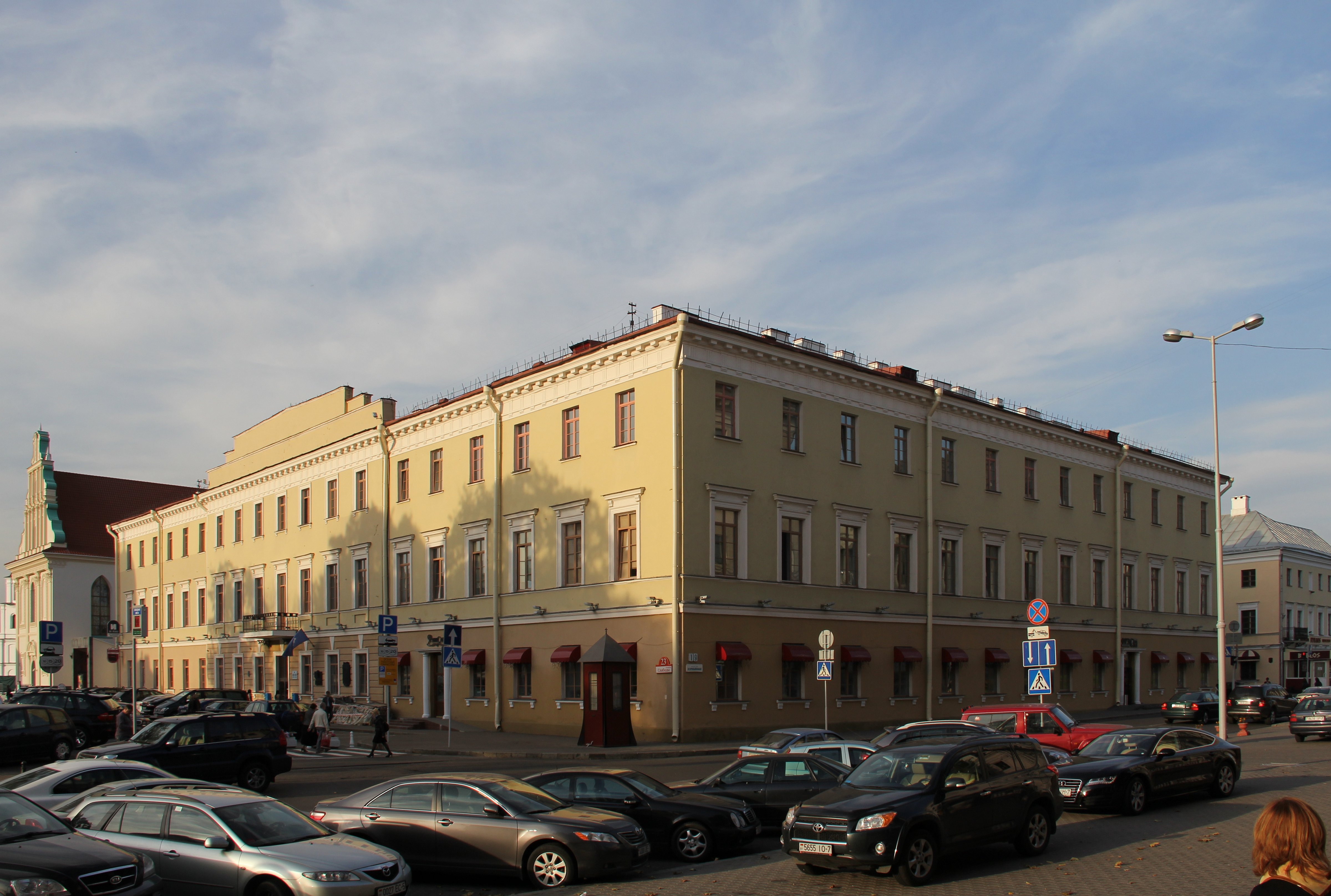 Беларуская (тарашкевіца): Комплекс будынкаў былога Сьвята-Духаўскага базылянскага манастыра: манастырскі корпус, манастырскі корпус, рэшткі Сьвята-Духаўскай царквы. г. Менск This is a photo of Belarusian heritage monument. Reference number: 712Г000238 ( WLM)